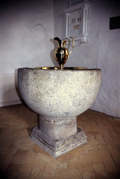 Bislev Kirke, Aalborg Kommune, døbefont